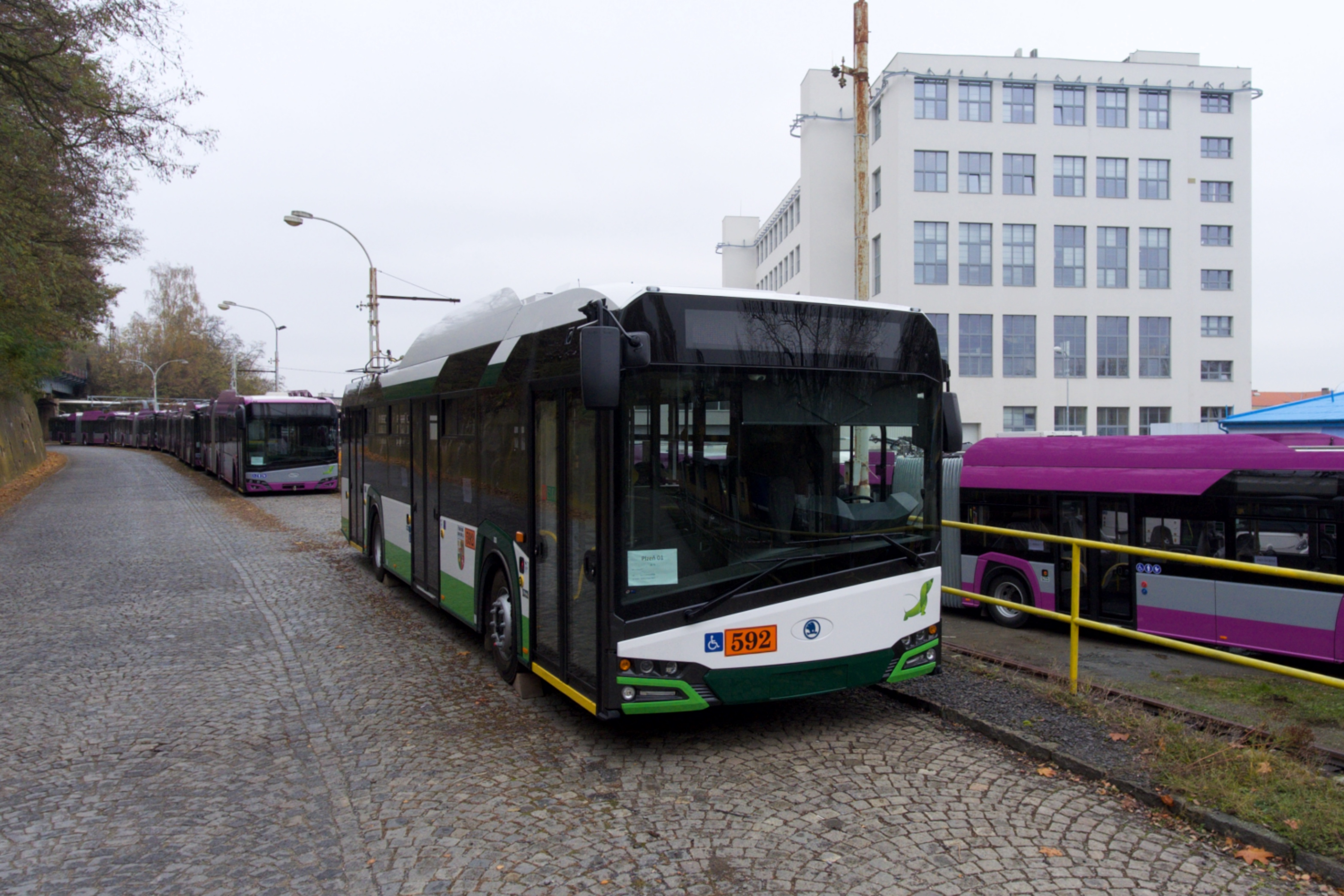 Škoda 26Tr s karoserií nové generace čeká na předání u výrobce.